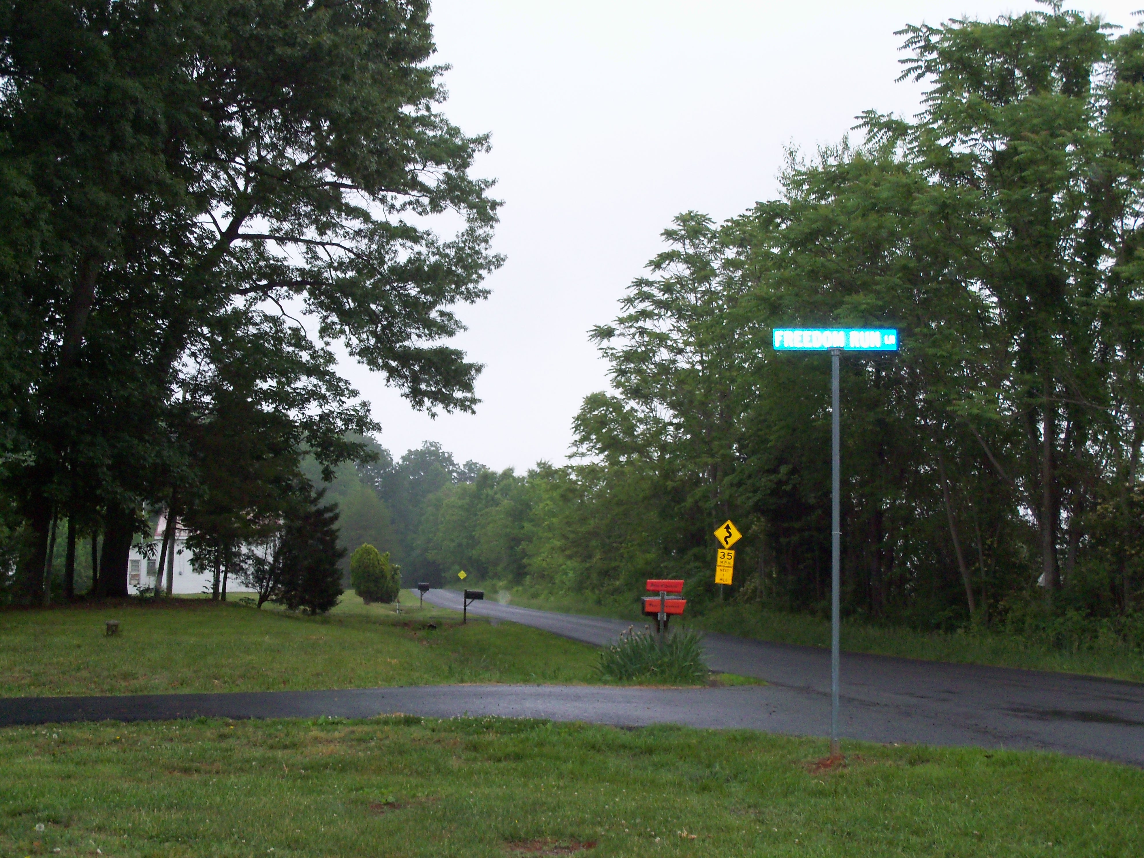 Freedom Run Lane